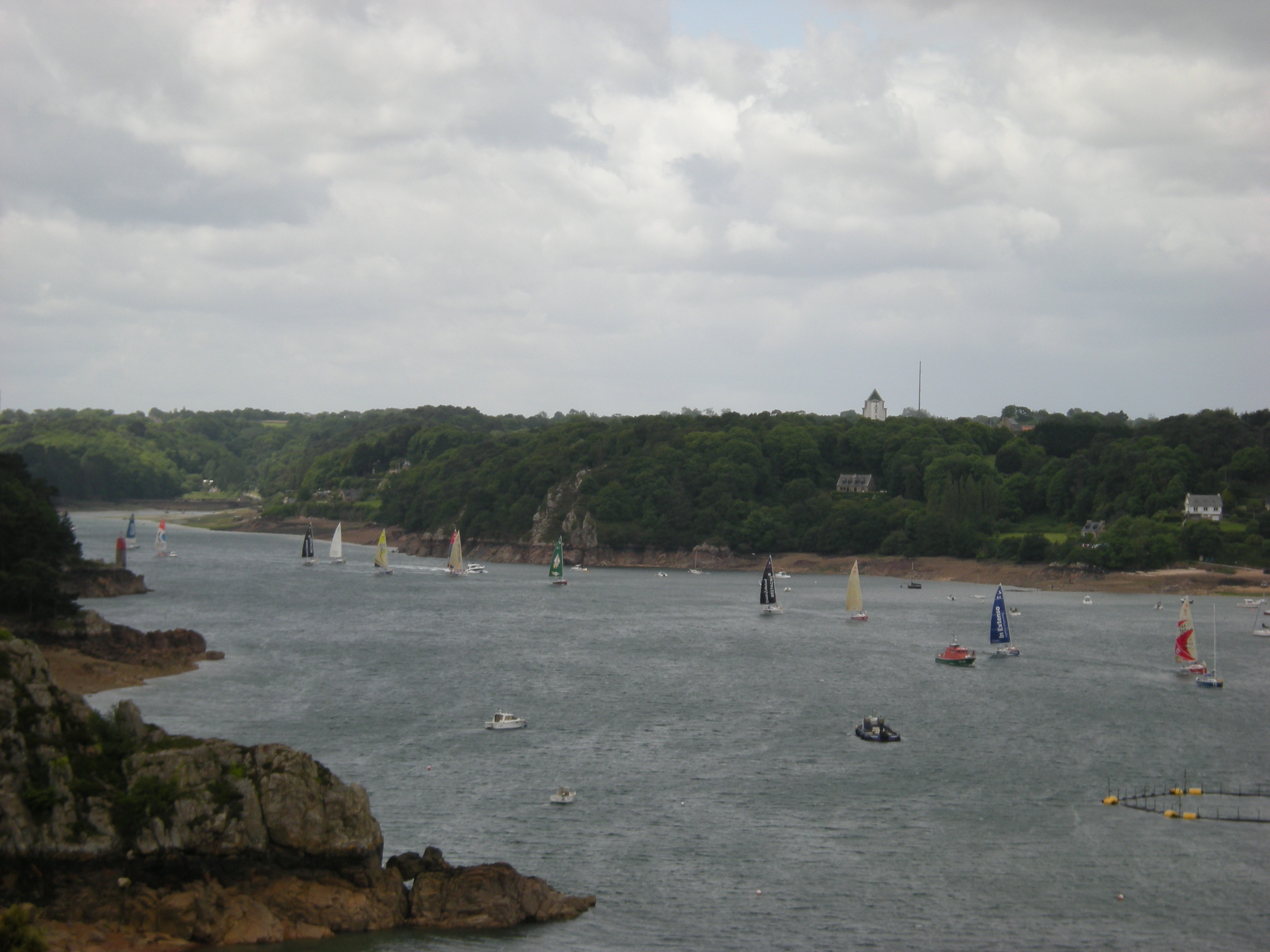 Descente du Trieux vers le départ du prologue de la Solitaire du Figaro 2012